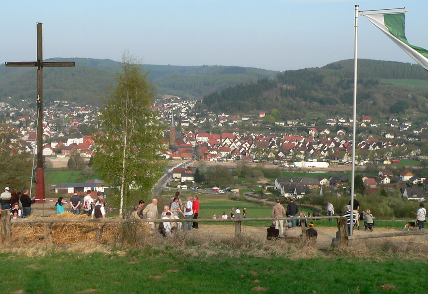 Blick auf Lüdge vom Osterberg